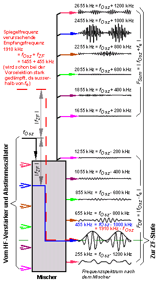 Signalverlauf Superheterodyne Mischer